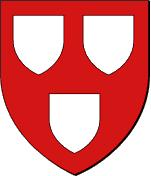 Blason de la famille de CHARNY